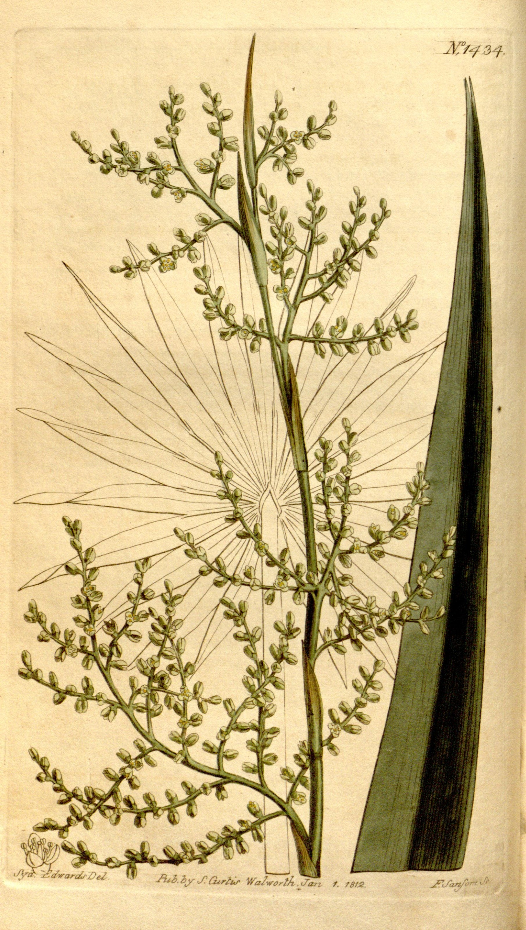 ftt&.hySatrfa WalwctACTati f. rBt2